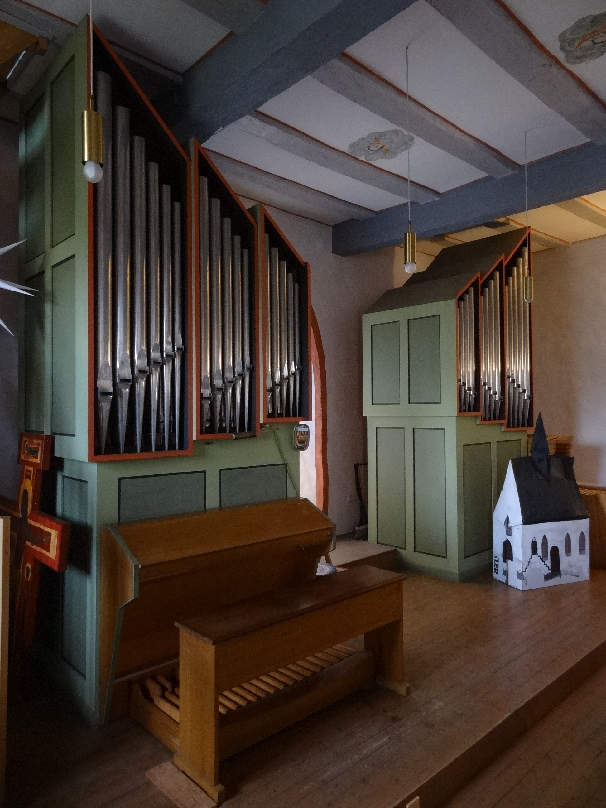 Margarethenkirche (Krofdorf)